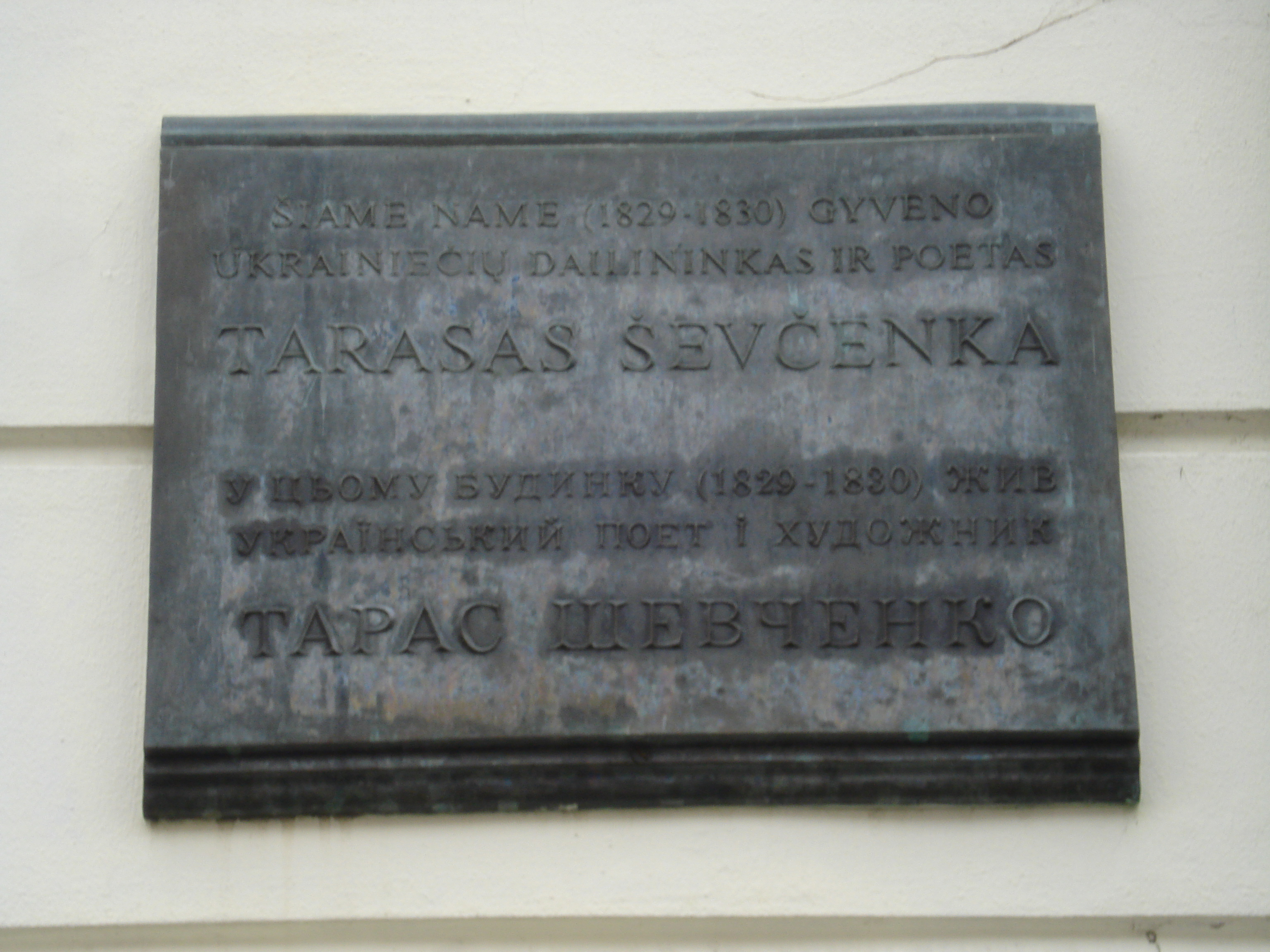 Taras Shevchenko memorial tablet in Vilnius (Didzioji g.)